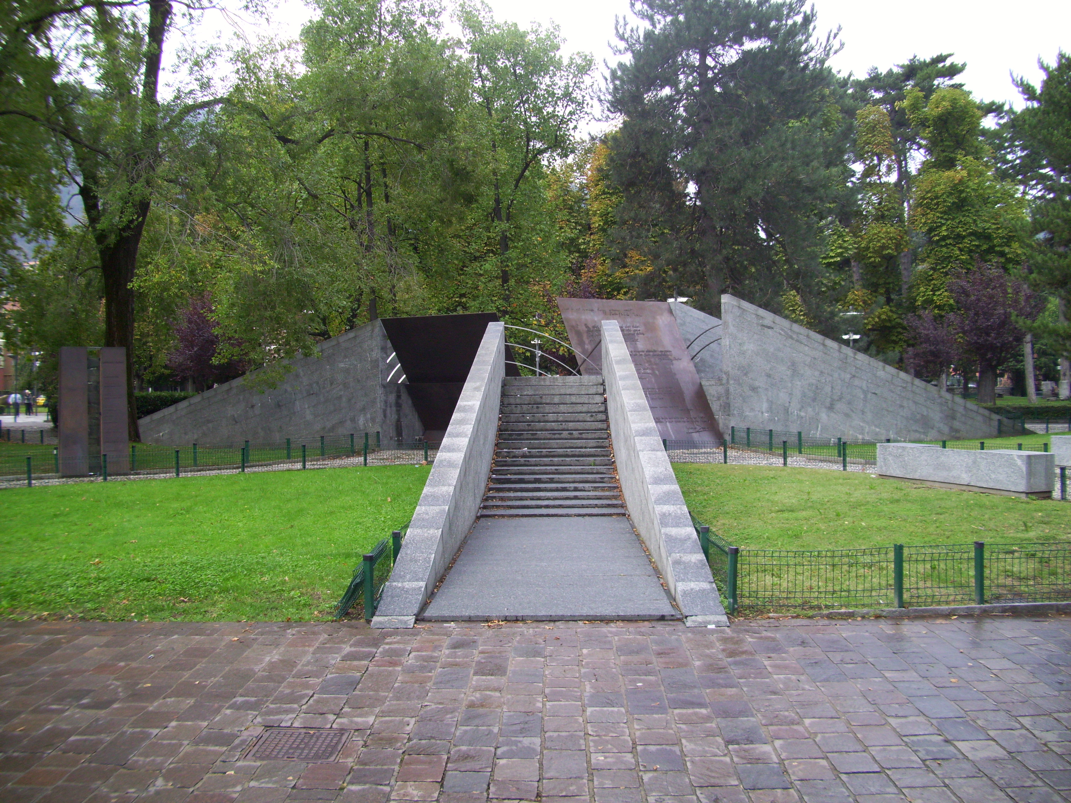 il Monumento alla Resistenza Europa, inaugurato nel 1983 alla presenza del Presidente Pertini.